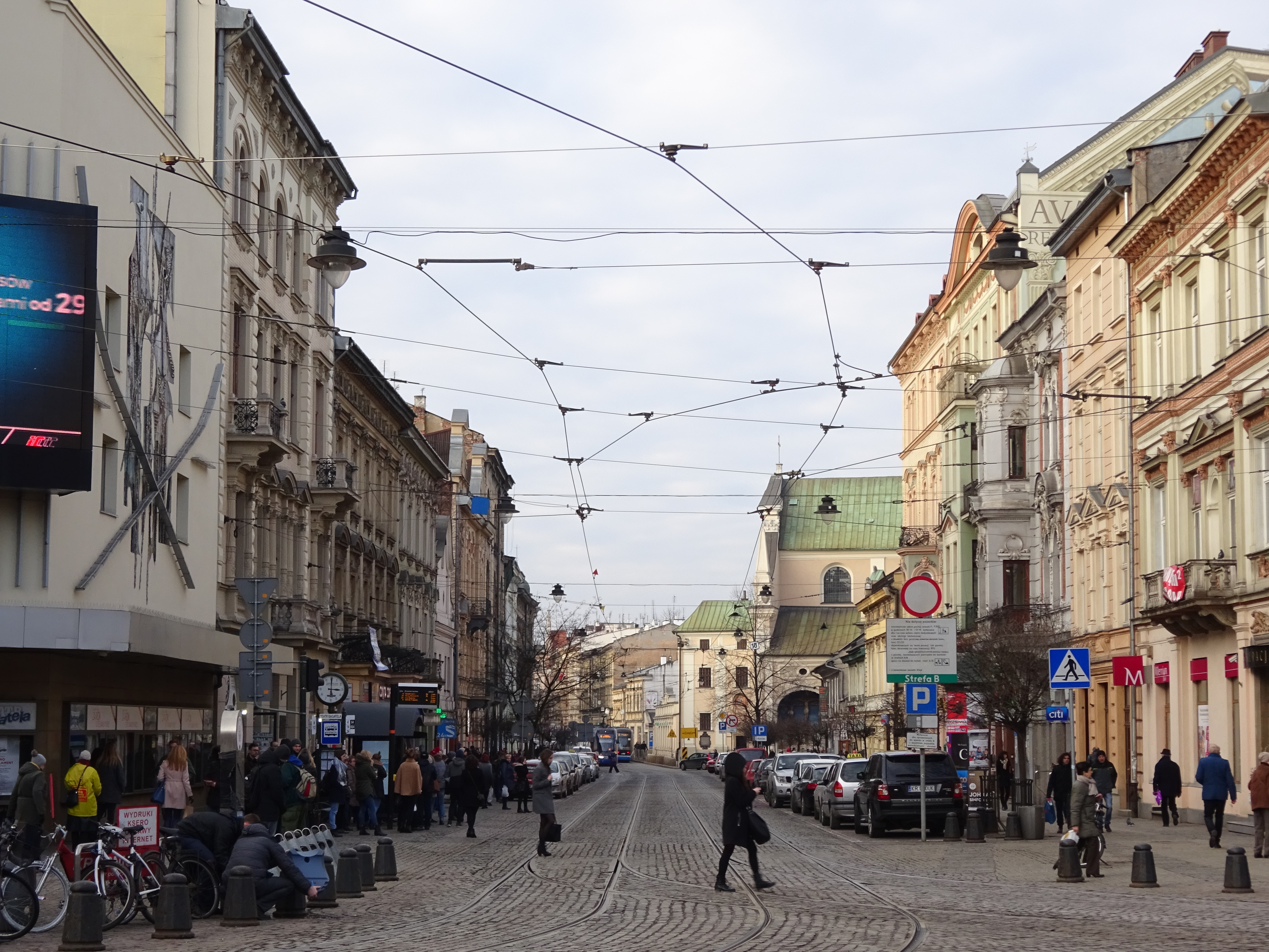 Ulica Karmelicka w Krakowie, widok z ulicy Szewskiej na północ.